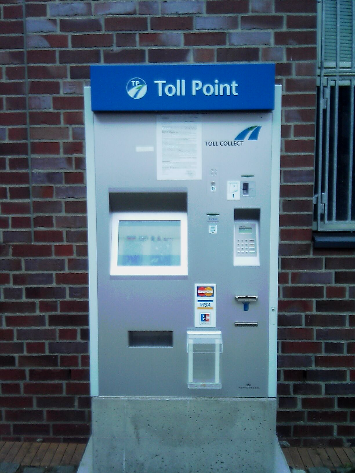 Autonome Mautstelle für LKW-Maut in Deutschland.